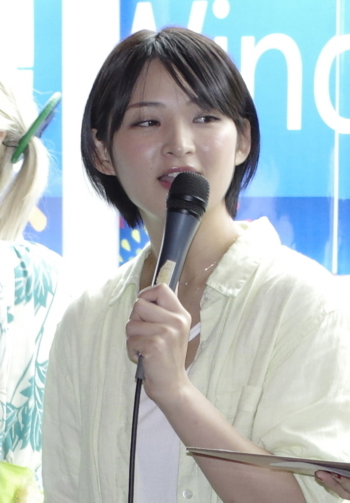 TSUKUMO eX. Windows 10 DSP版発売記念イベント 鈴木咲